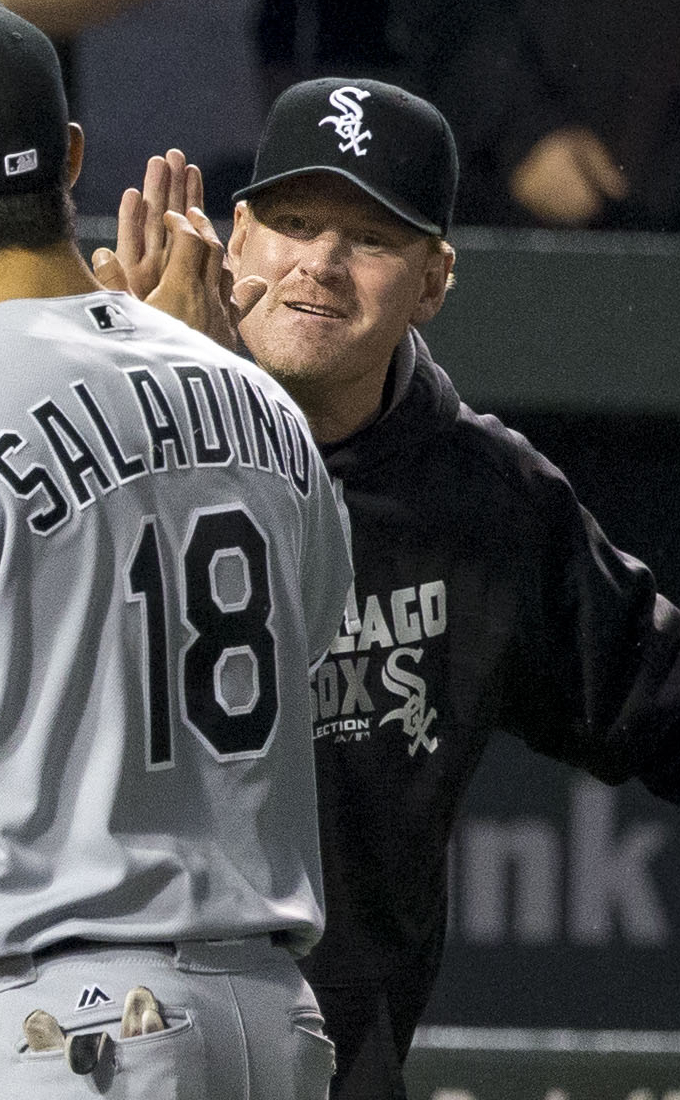 Greg Sparks